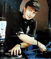 Боян Илчев